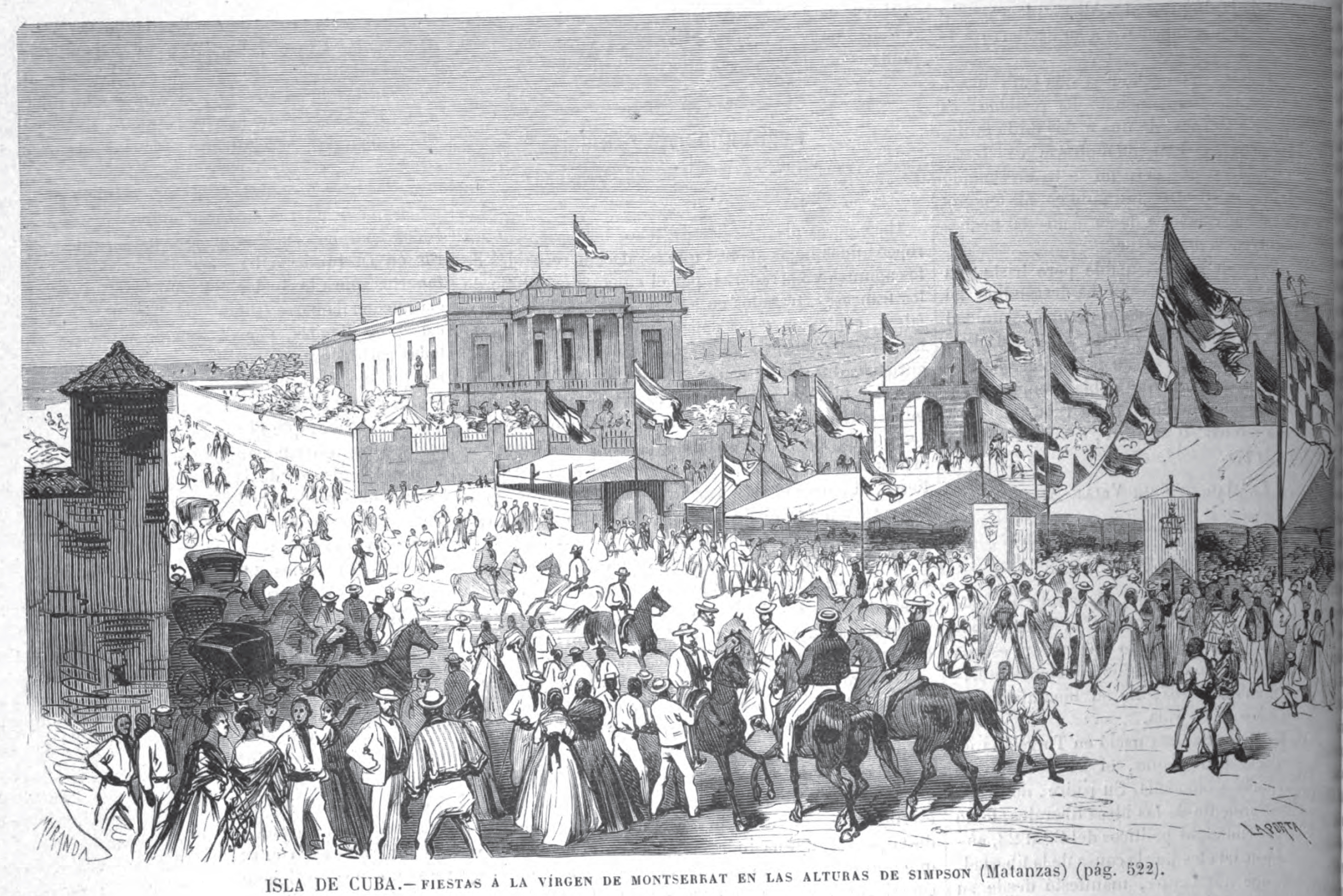 Isla de Cuba.—Fiestas á la virgen de Montserrat en las alturas de Simpson (Matanzas).